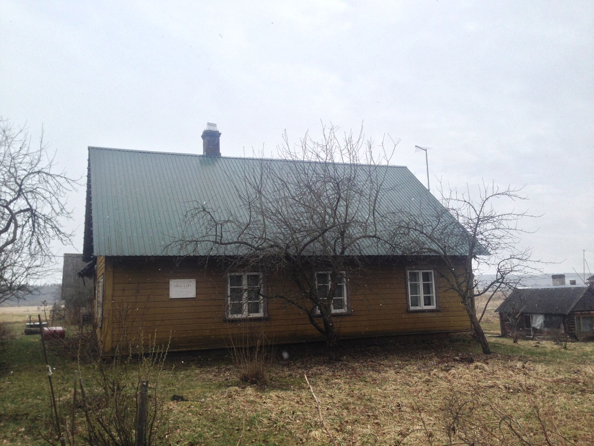 Jaan Sarve sünnikodu